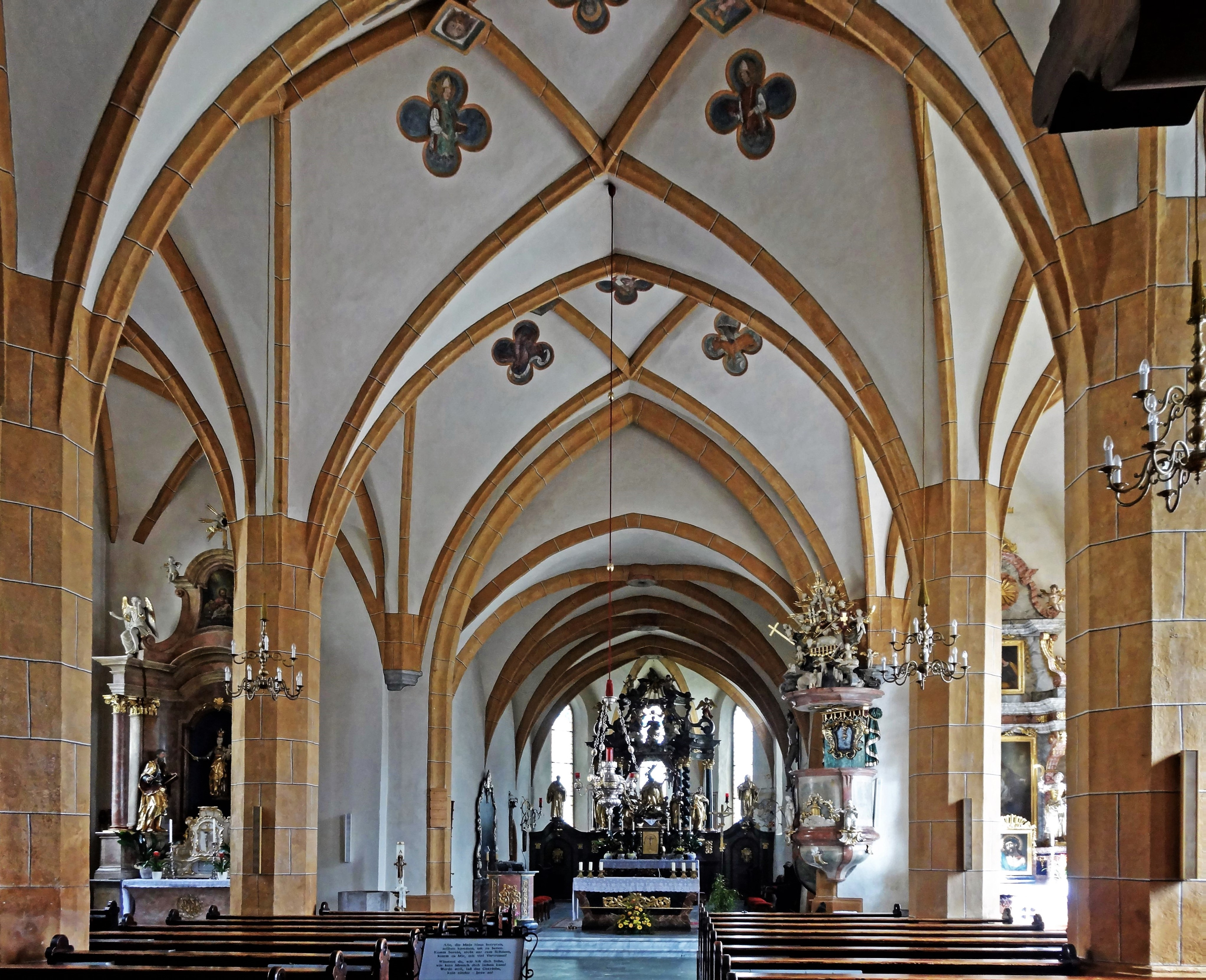 Kath. Pfarrkirche Hll. Hermagoras und Fortunatus (Hermagor-Pressegger See), Innenansicht